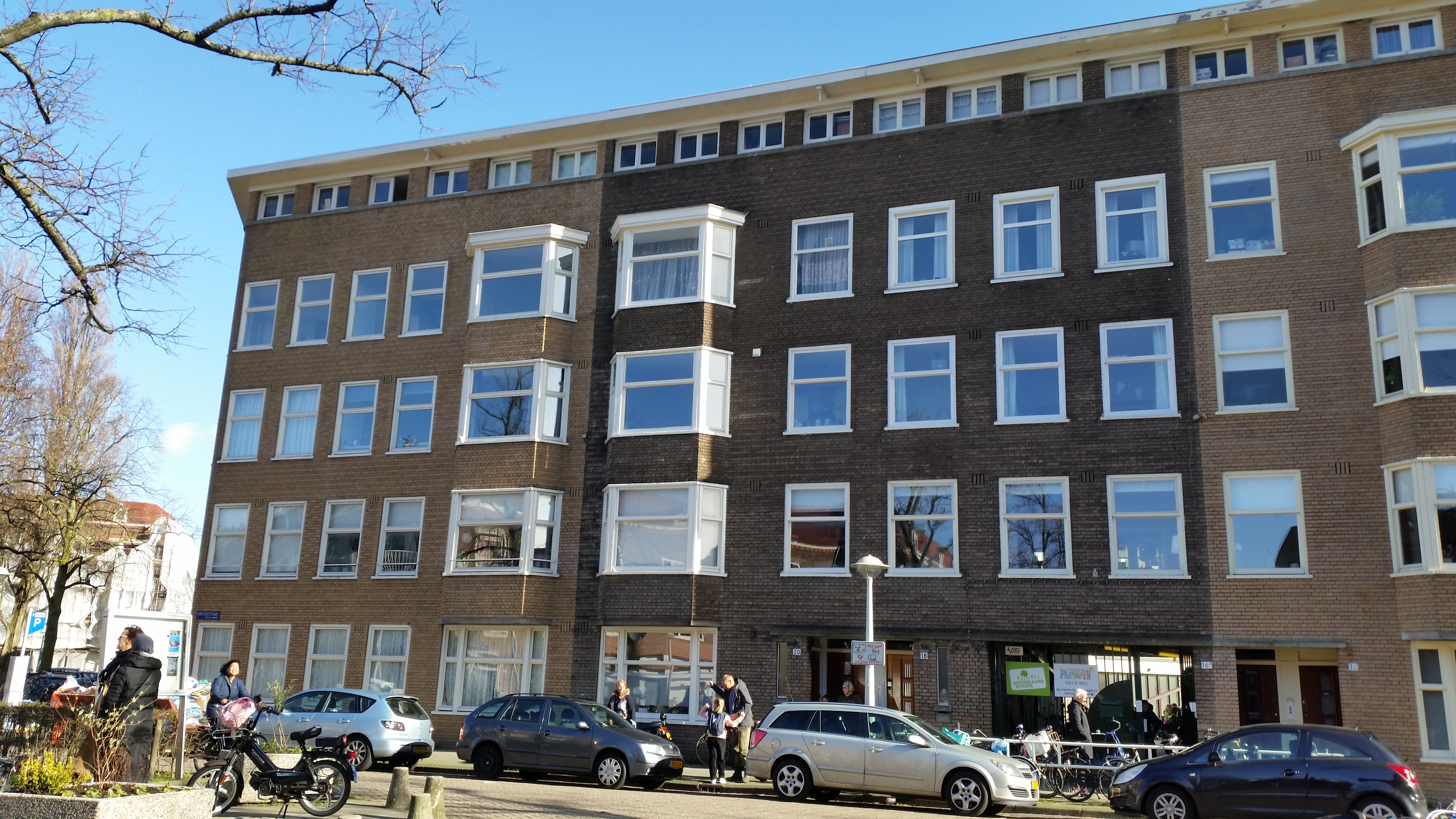 Van Gentstraat, Amsterdam